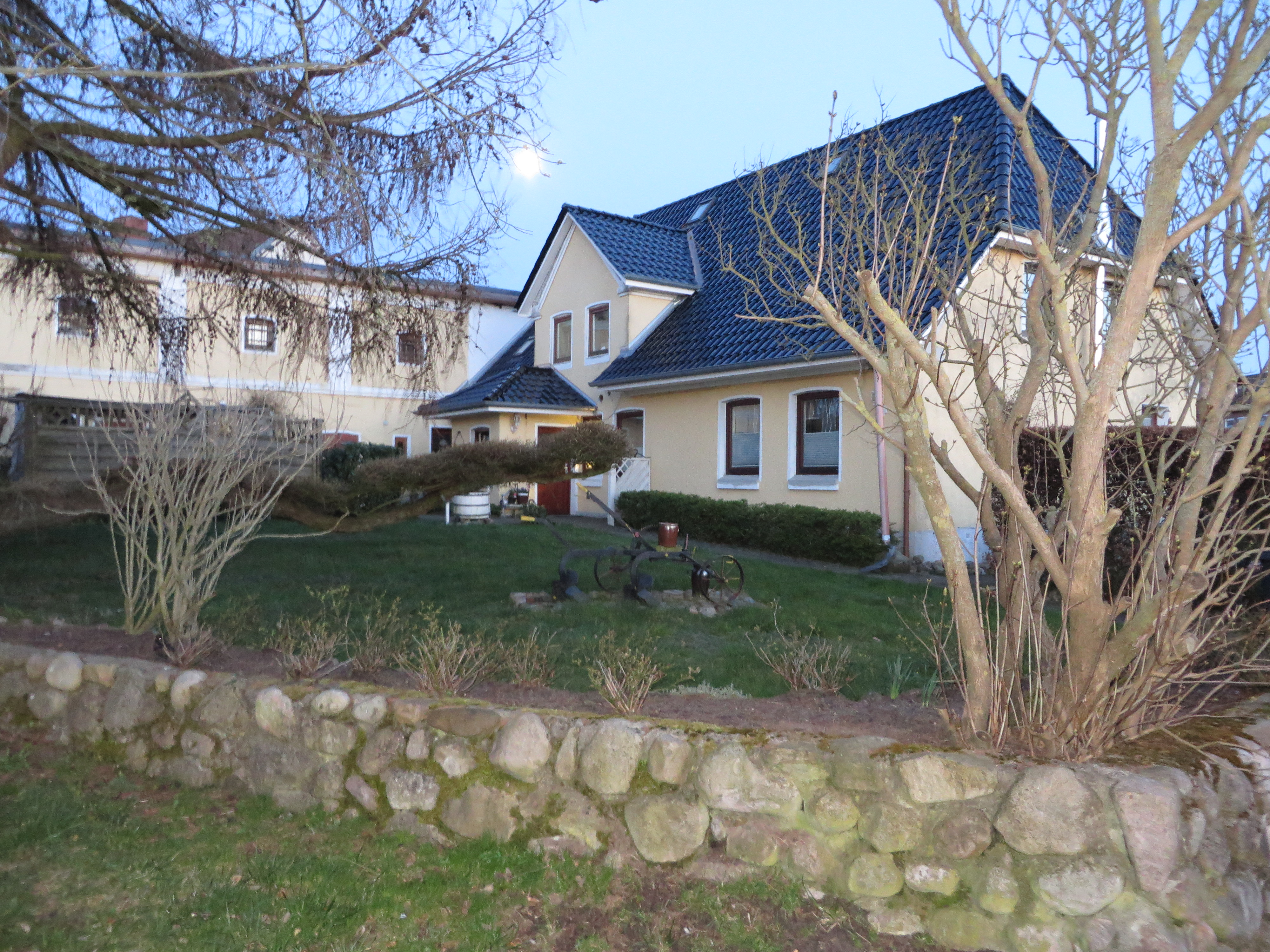 Bauernhof Twedter Feld (1), Flensburg-Mürwik 2015 , Bild 03